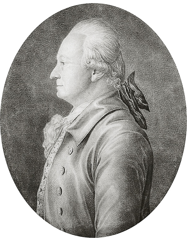 Porträt des pfalz-zweibrückischen Hofarchitekten Christian Ludwig Hautt